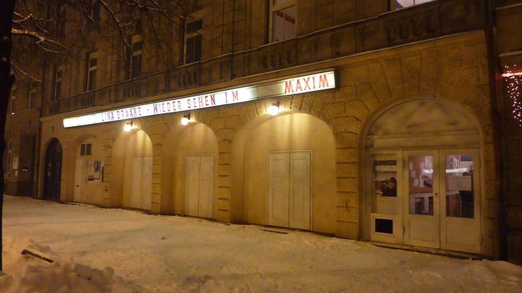 Das Neuhauser Programmkino Maxim von außen